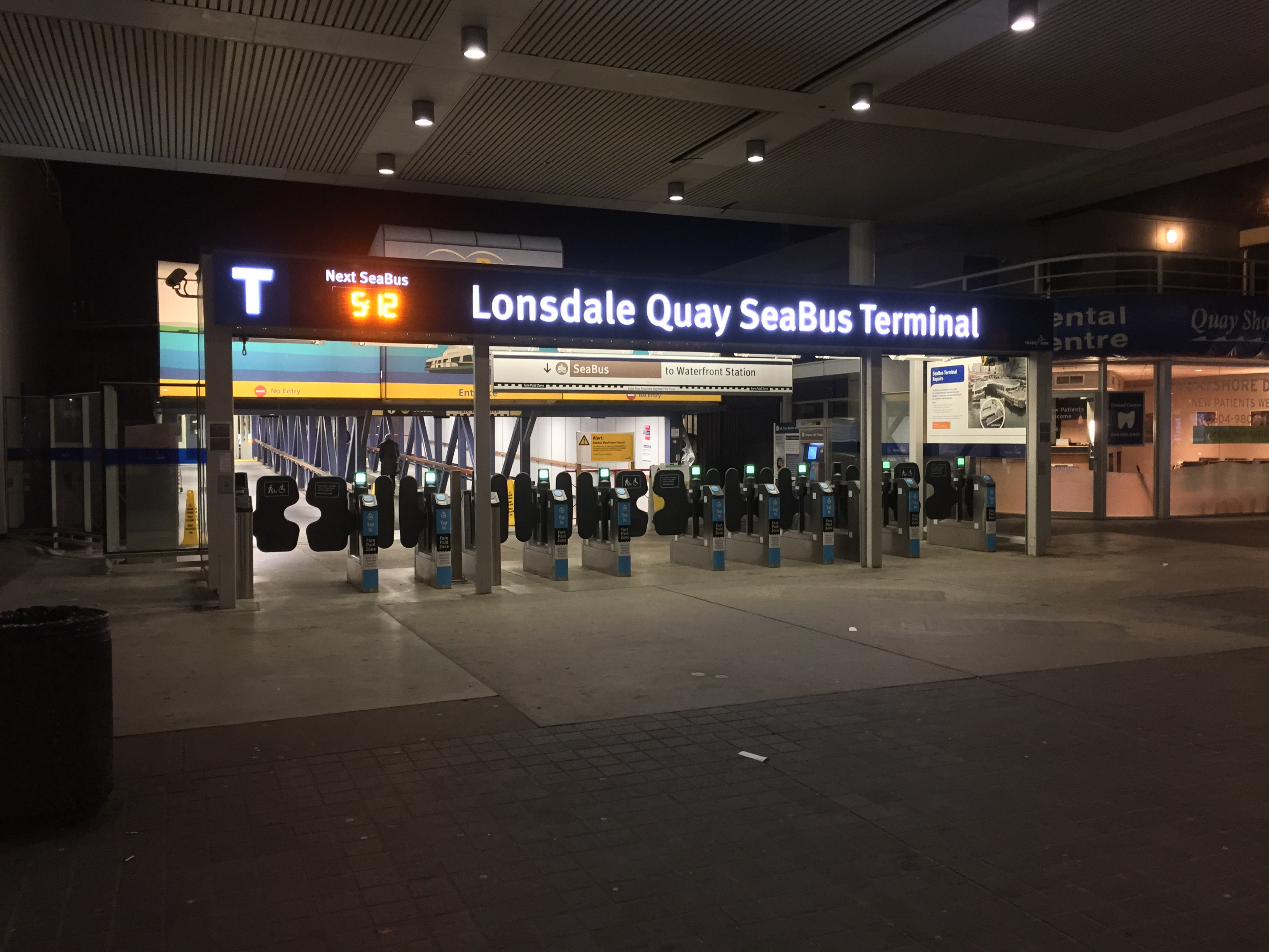 Terminus de SeaBus à Quai Lonsdale, North Vancouver, Colombie-Britannique, Canada. 粵語: 加拿大卑詩省北溫哥華朗斯地亞碼頭嘅海上巴士站。